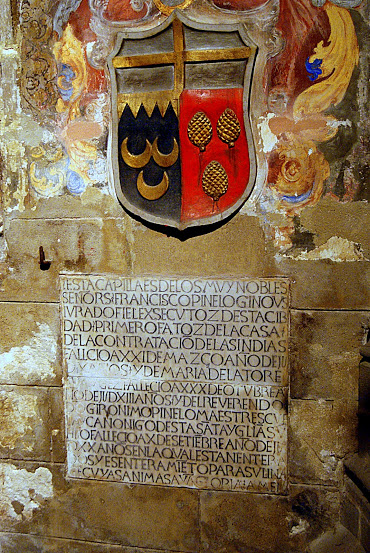 Escudo de armas de los Pinelo y lápida de Francisco Pinelo († 1509) en la capilla del Pilar de la catedral de Sevilla, (España).